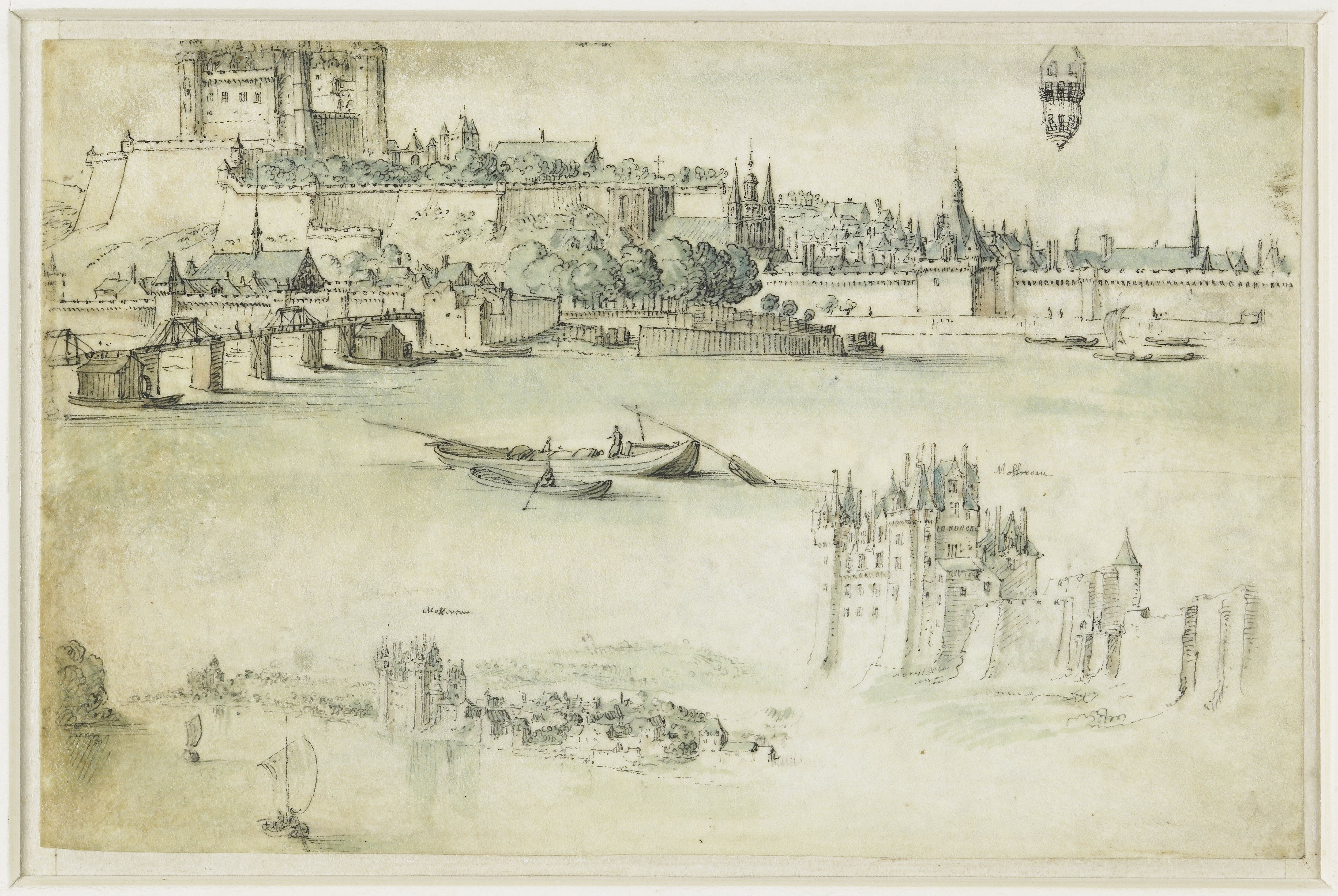 IdentificatieTitel(s): Loire-landschap met de kastelen Saumur en MontsoreauObjecttype: tekening aquarel Objectnummer: RP-T-1948-371(R)VervaardigingVervaardiger: tekenaar: anoniemDatering: 1600 - 1650Fysieke kenmerken: pen in zwart in bruin en pen in zwart, penseel in waterverf op perkamentMateriaal: perkament waterverf inkt Techniek: pen / penseelAfmetingen: h 112 mm × b 175 mmOnderwerpWat: river (+ landscape with figures, staffage)castleWaar: LoireChâteau SaumurChâteau MontsoreauVerwerving en rechtenVerwerving: aankoop 1948Copyright: Publiek domein